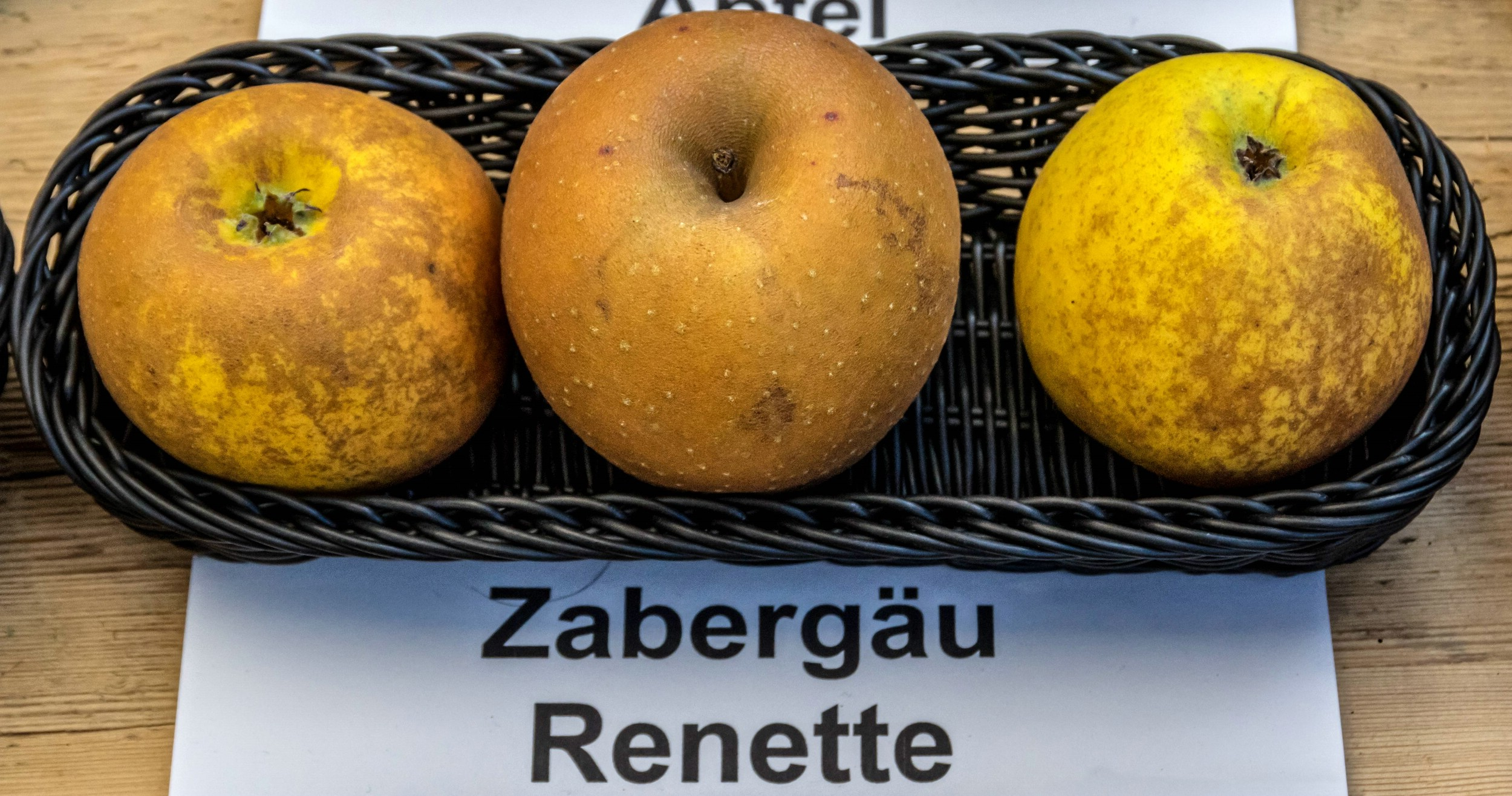 Alte Apfelsorten, von denen es im Badischen noch tragende Bäume gibt. Alle Aufnahmen au dem Oktober 2015